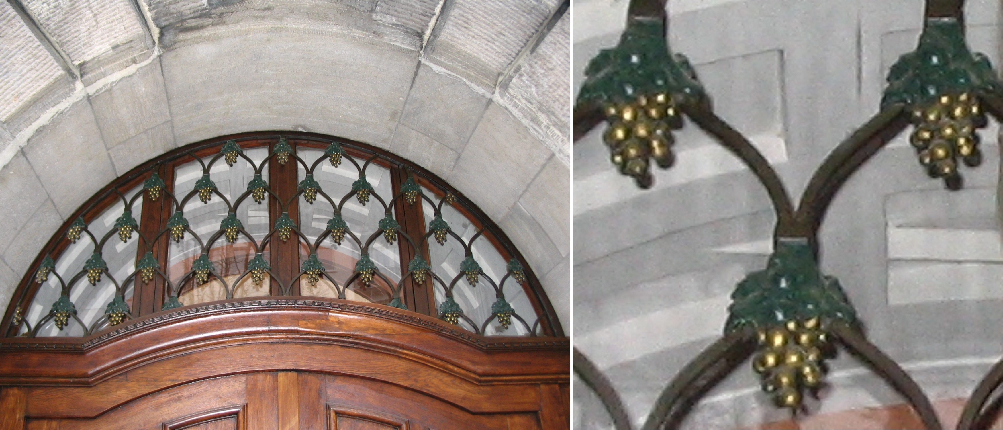 Trauben- und Weinlaub-Schmuck (rechts eine Detail-Ansicht) am Oberlichtgitter des Tores des Verwaltungsgerichts Mainz, in dem sich früher die Großherzoglich-Hessische Weinbau-Domäne befand.